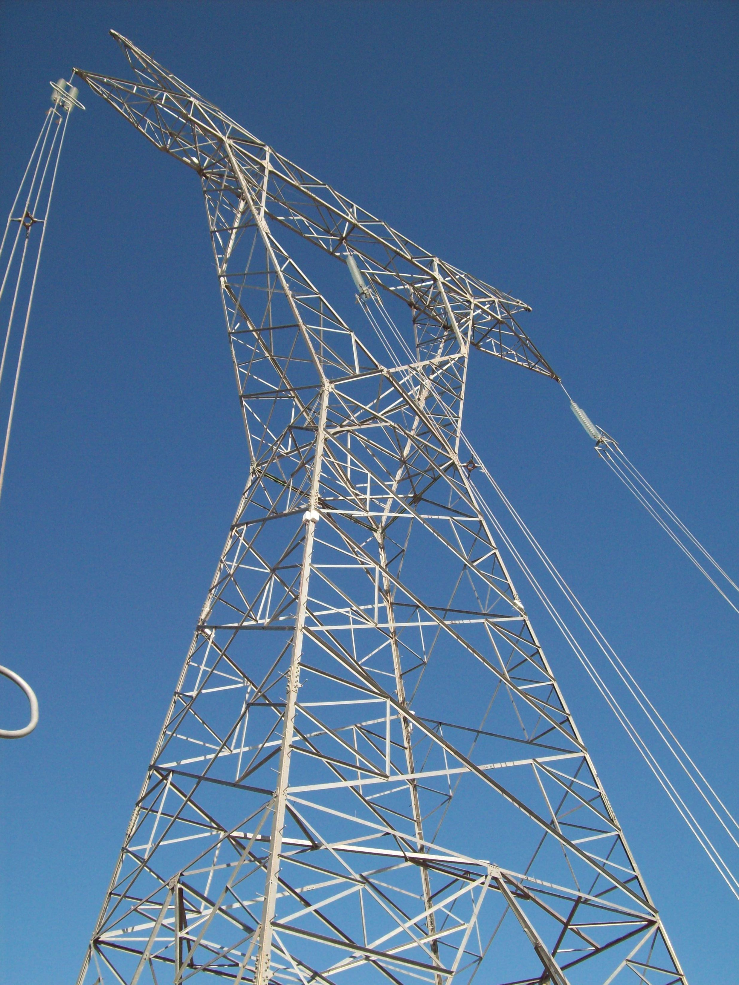 Torre de alta tensión (para 300 a 500 kV) en Tecnópolis.